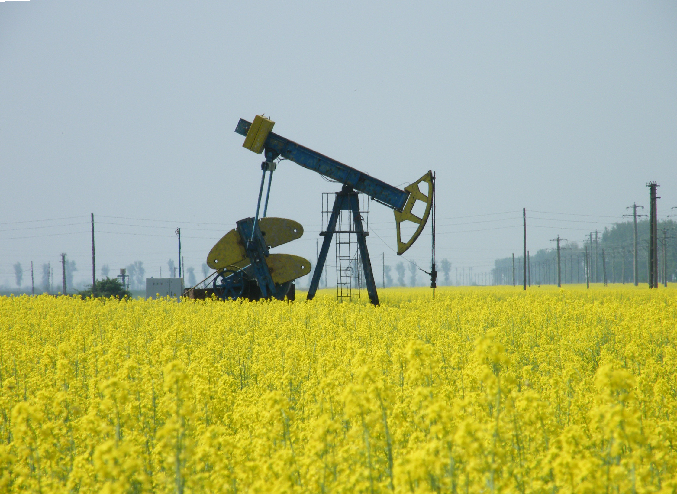 Sonda de pompare titei si cultura de rapita - iesire sud-vest Bordei Verde Restricţii - fără restricţii